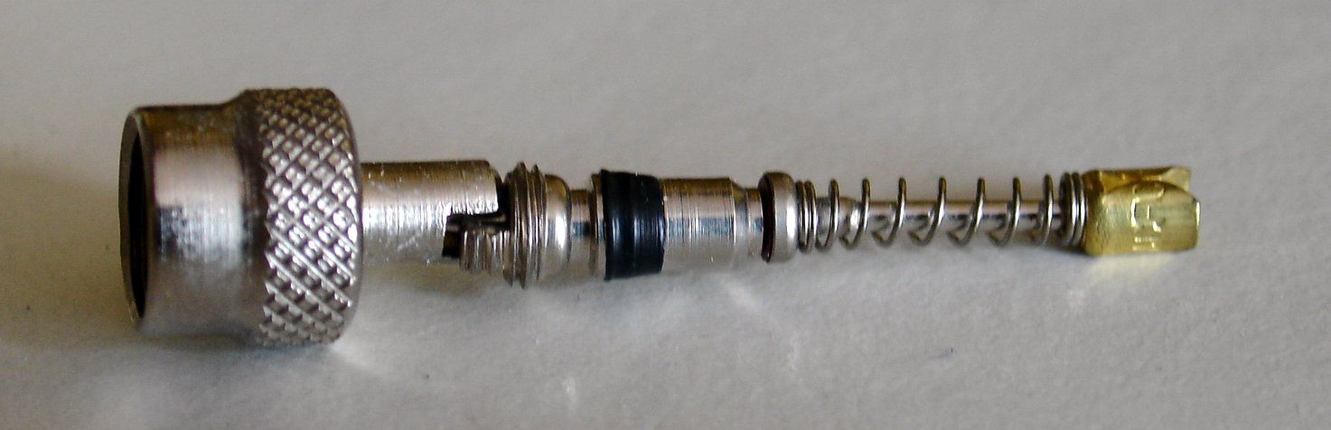 Kaperka i wentyl (2)